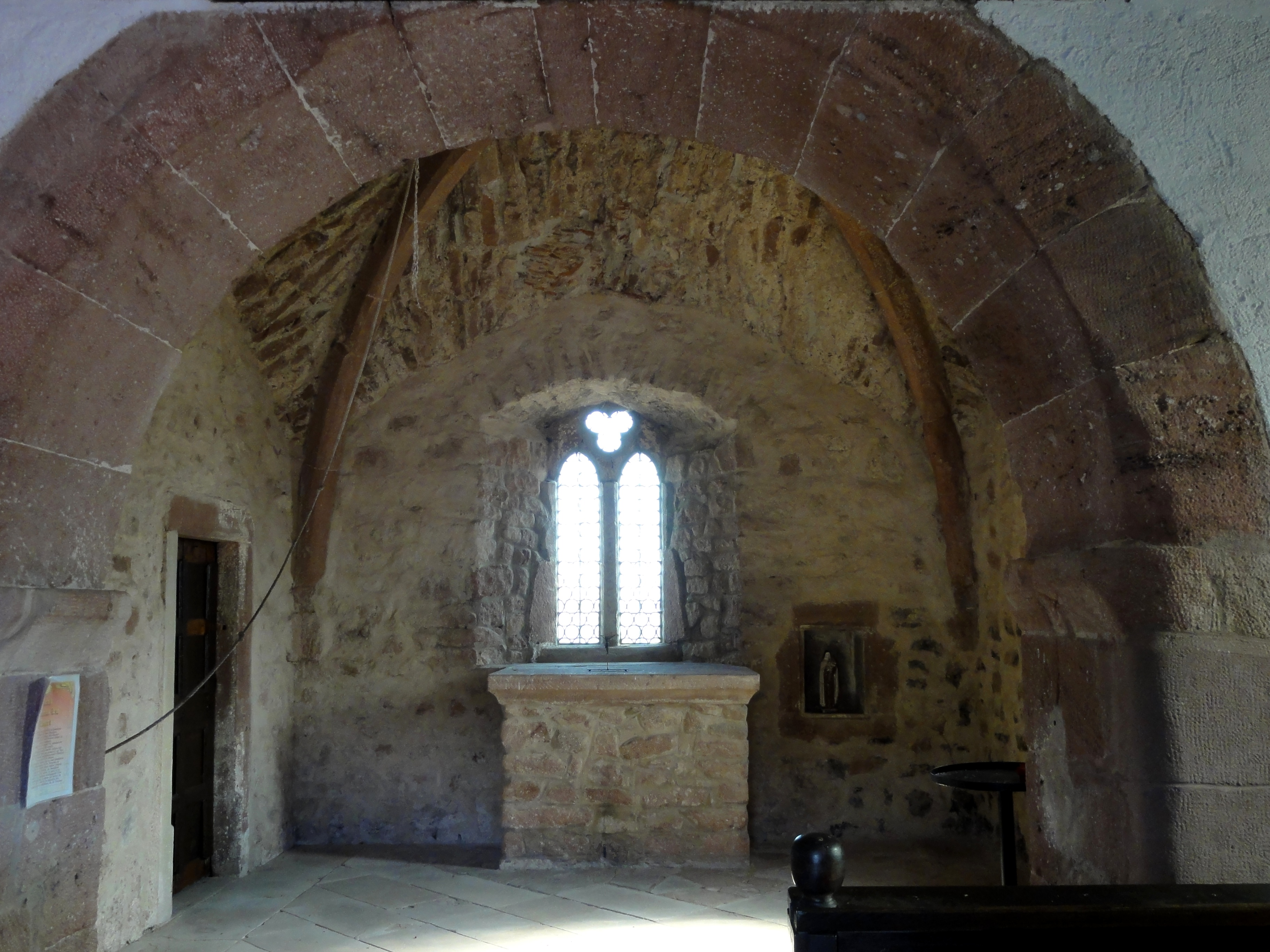 Alsace, Bas-Rhin, Wisches, Église Saint-Antoine (XIIIe-XVIe), actuellement chapelle de cimetière ((IA67013051).